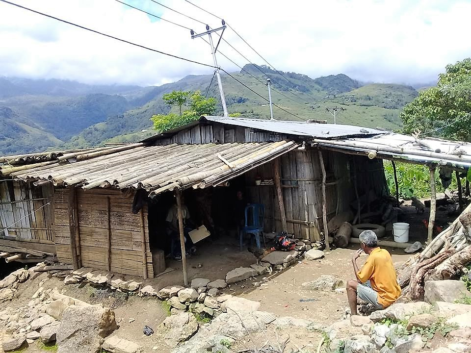 Hütte in Batu Mano, Atsabe, Ermera, Osttimor